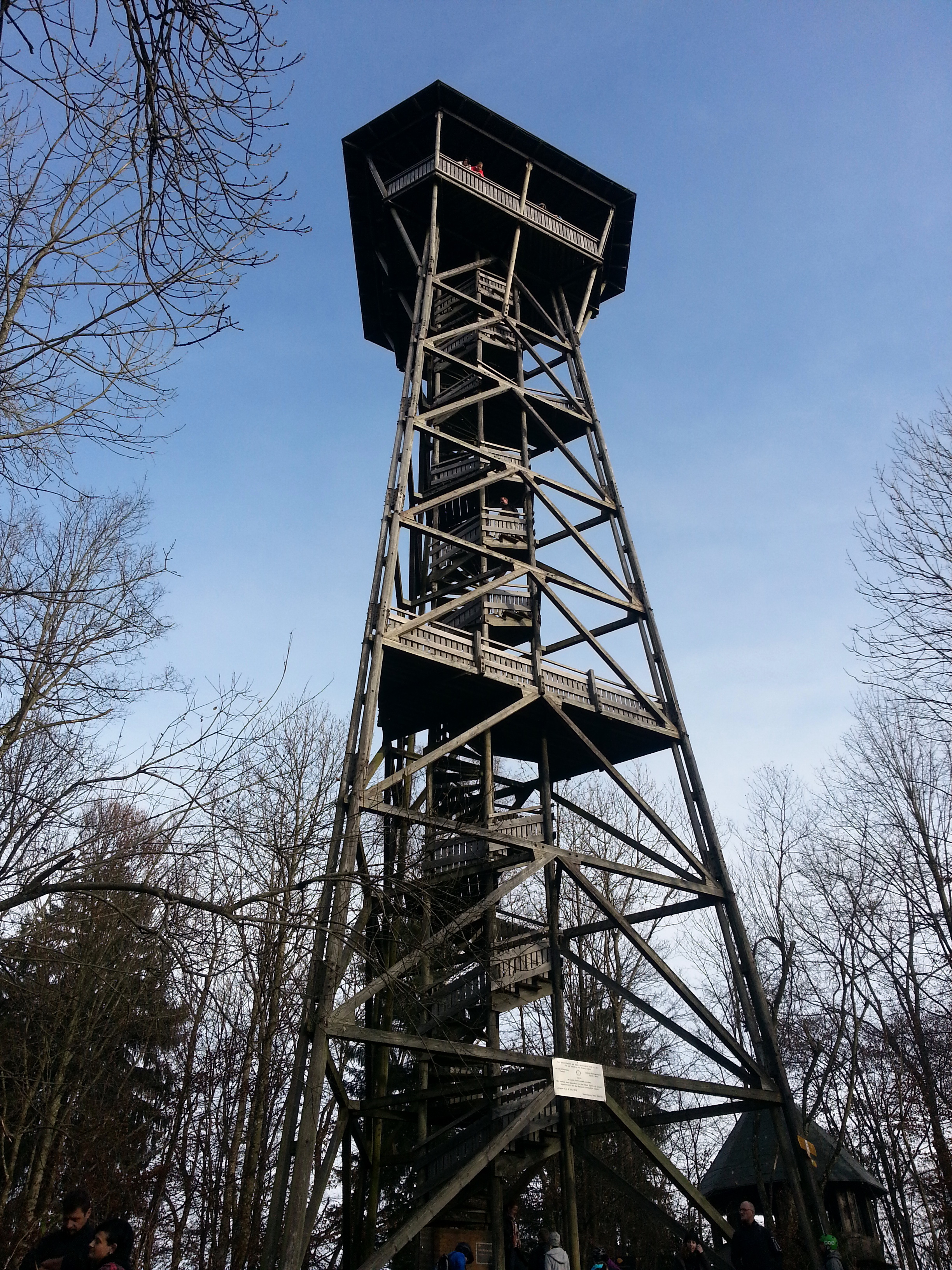 Albisturm, Langnau am Albis